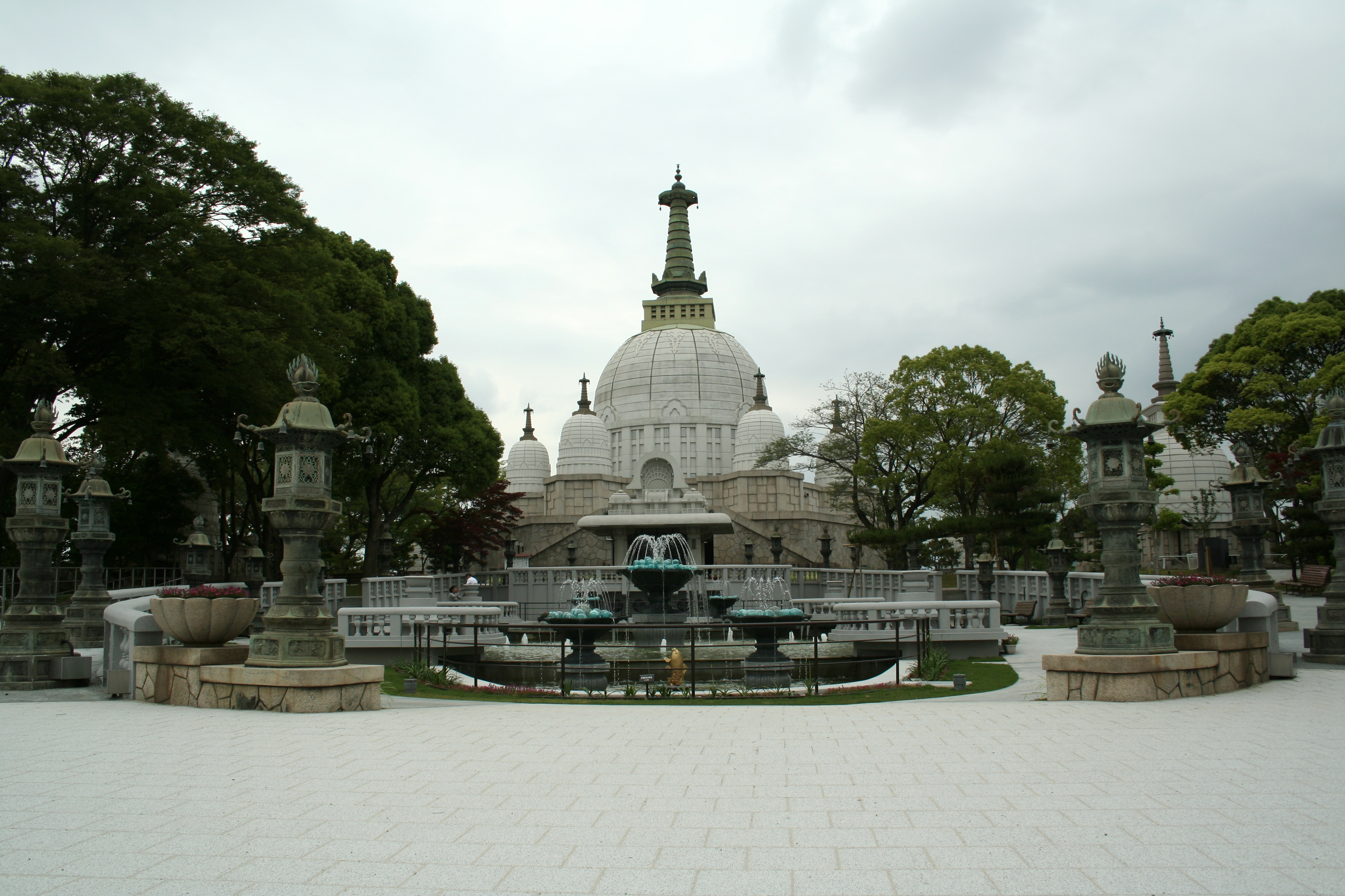 名古山霊苑。 霊苑にある仏塔と噴水。